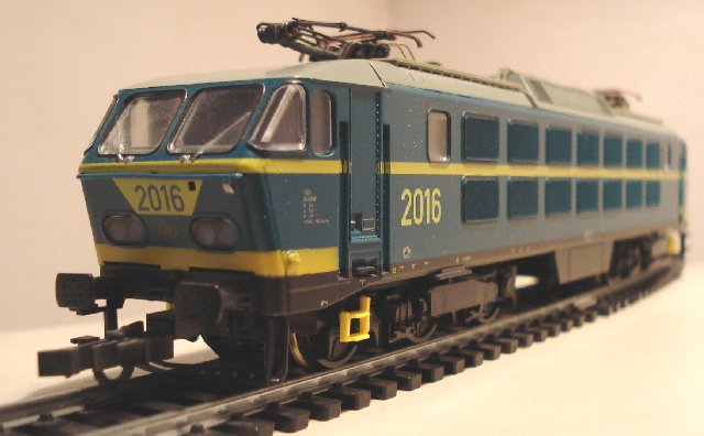 De 2016 van de NMBS gemaakt door Roco - Foto genomen door Jo Cabooter Categorie:Afbeelding modeltrein